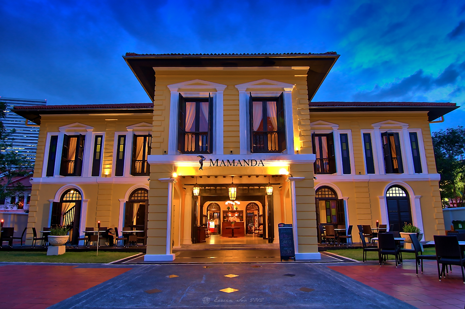 Mamanda, Kampong Glam